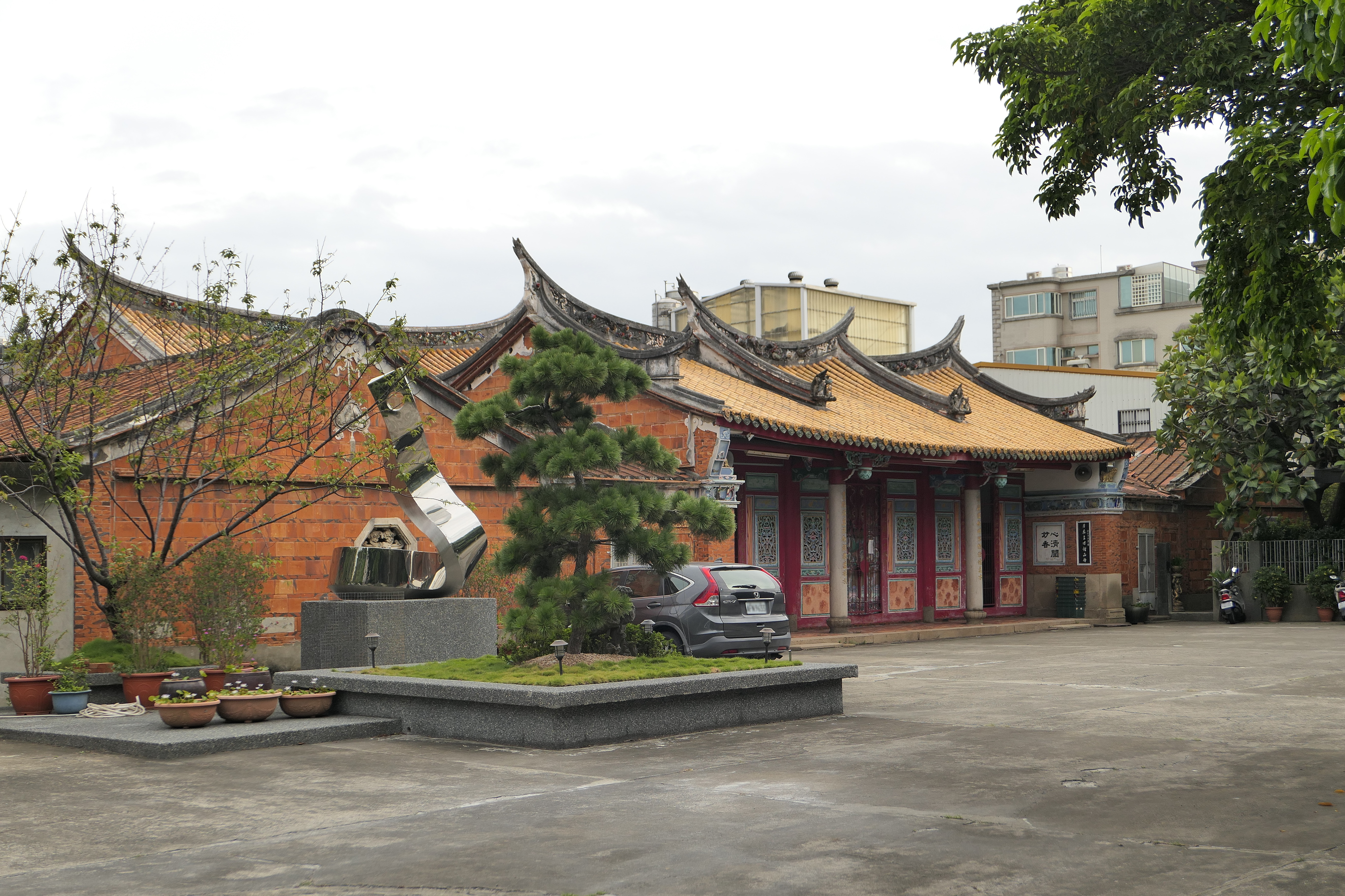 新竹淨業院